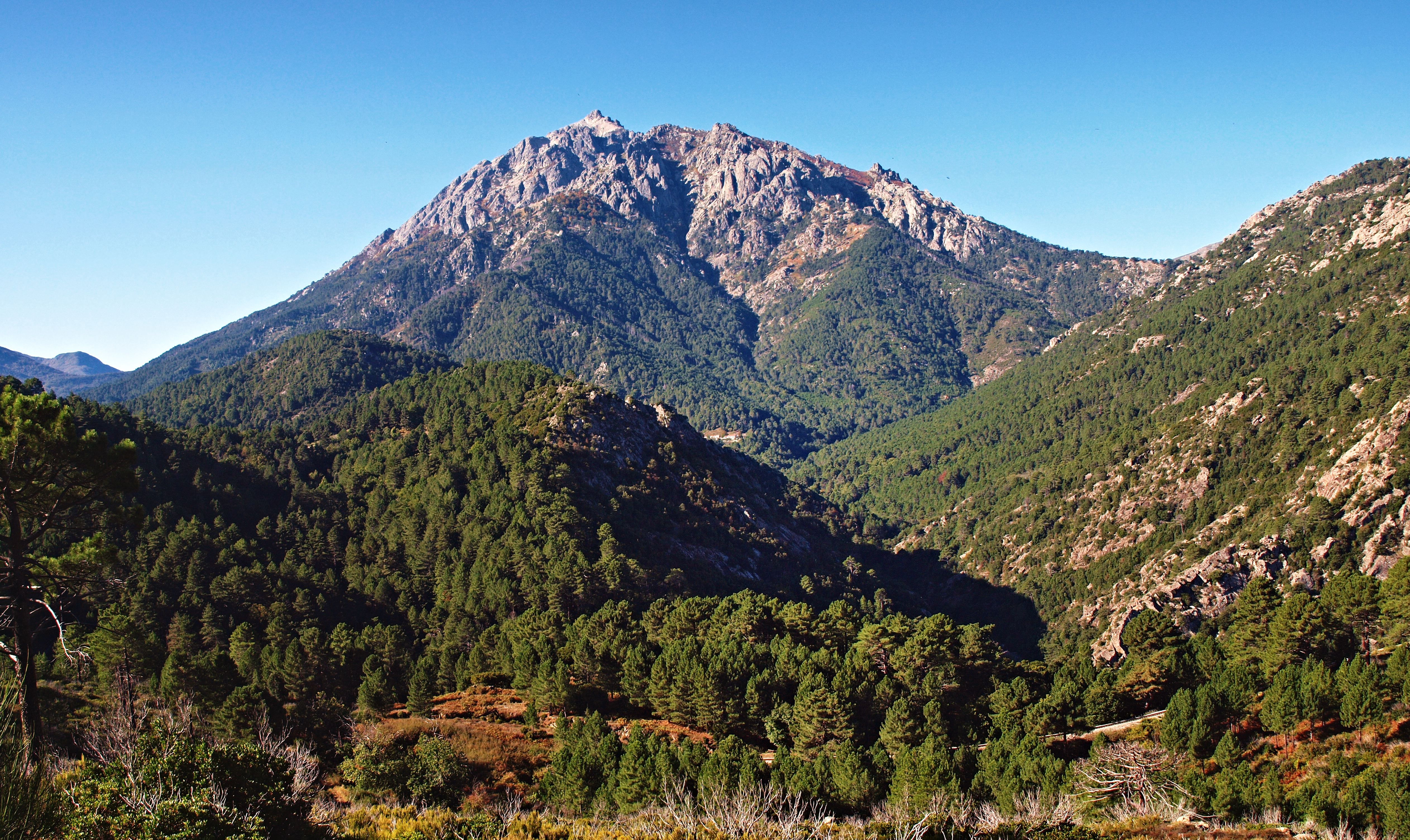 Vivario (Corsica) - Le Monte d'Oro (2389 m) et partie de la forêt de Vizzavona